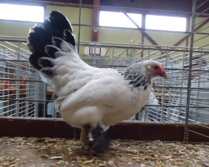 Poule